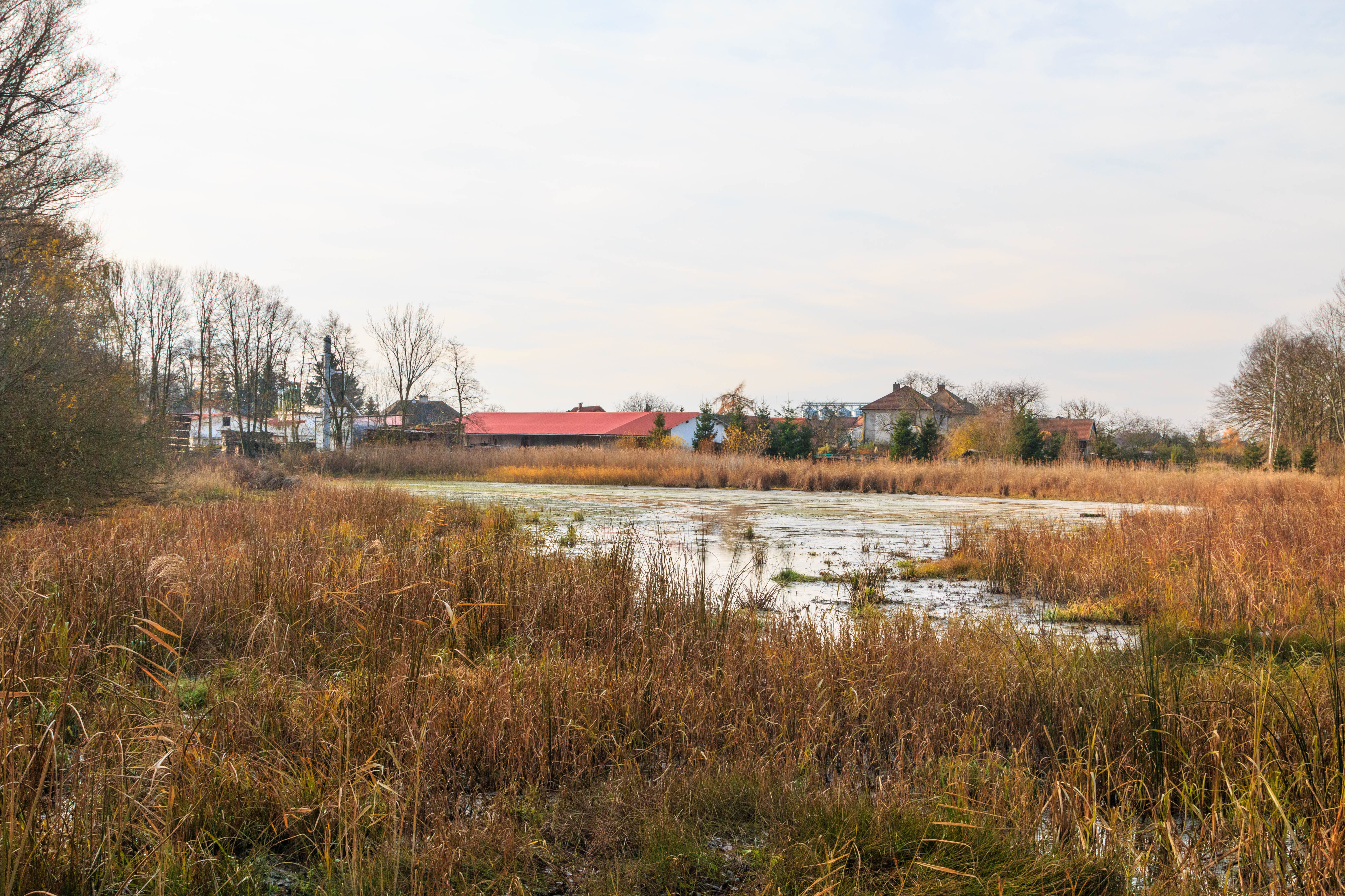 rybník pod rybníkem Beránek ve Volči Project: Vodstvo.